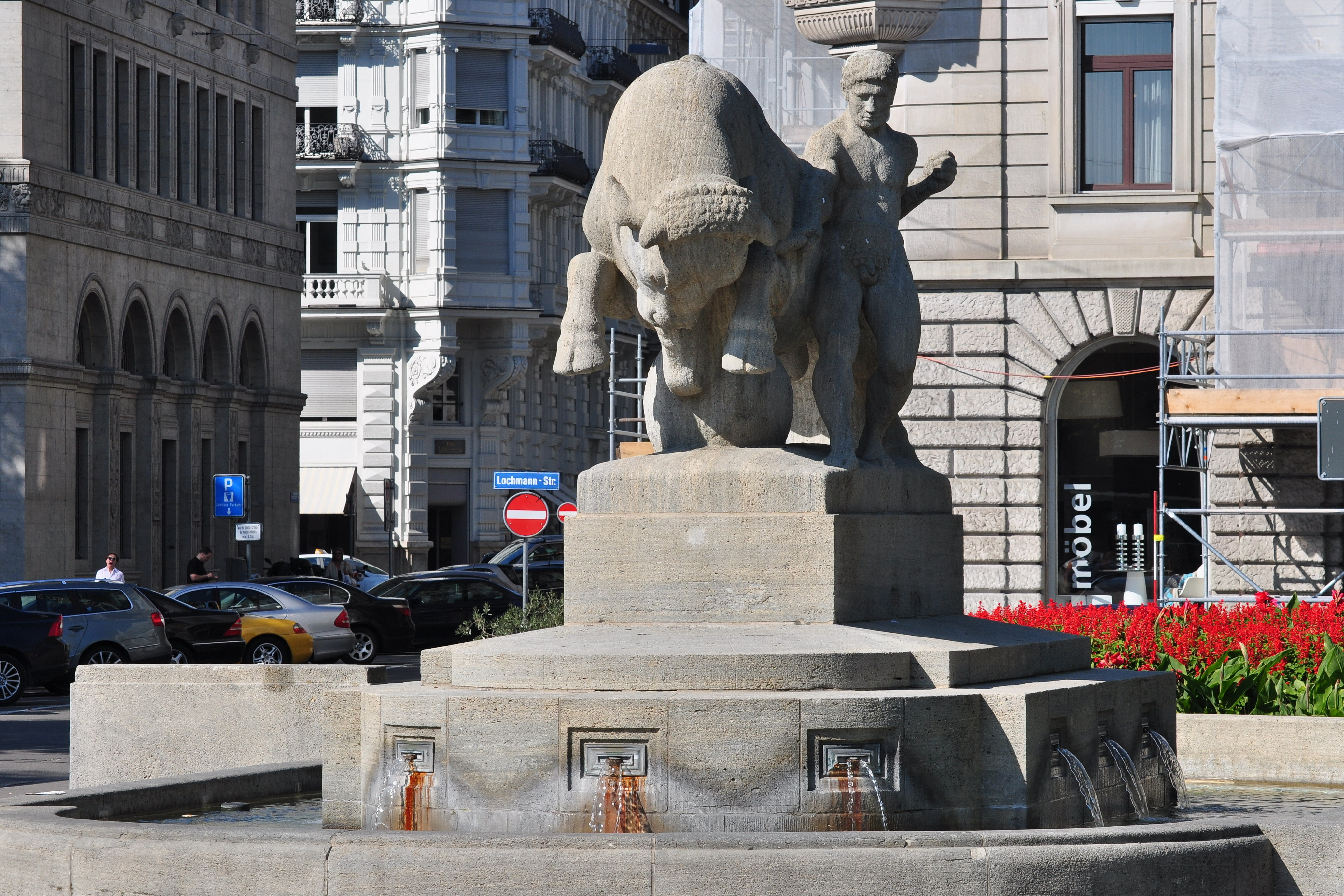 Geiserbrunnen built by Jakob Brüllmann in 1910/11 at Bürkliplatz in Zürich (Switzerland), Stadthausquai in the background.Der Stadt Zürich gewidmetArnold GeiserStadtbaumeister von 1875-1902